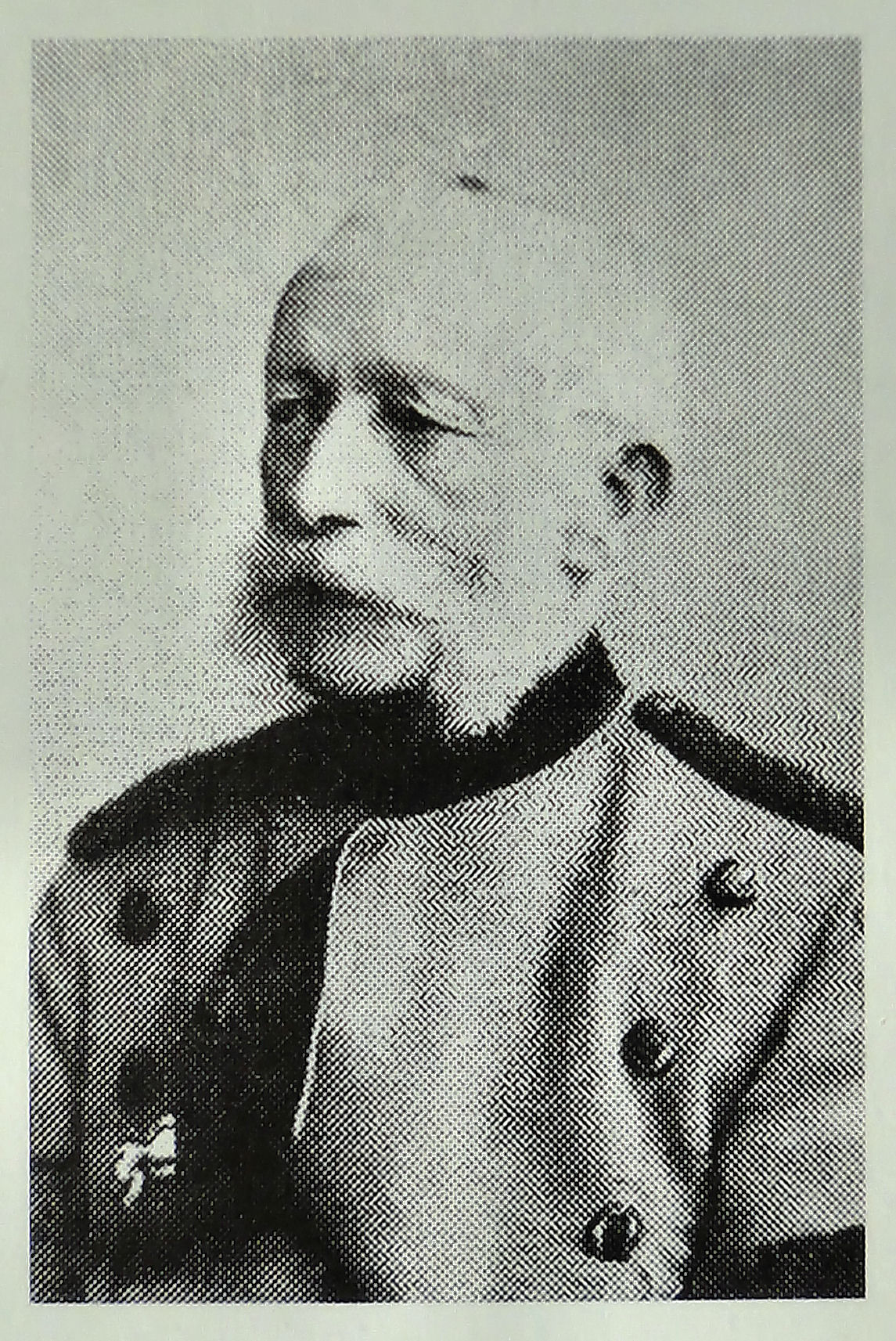 Carl Ludig Gené